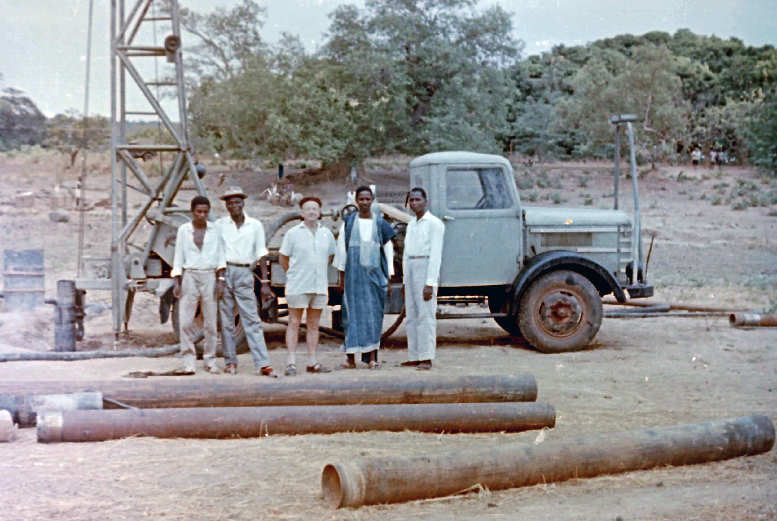 A kép Guineában készült. A képen az a csepel teherautó látszik amivel Dr. Ferencz Károly és csapata a kútfúásokat végezte.